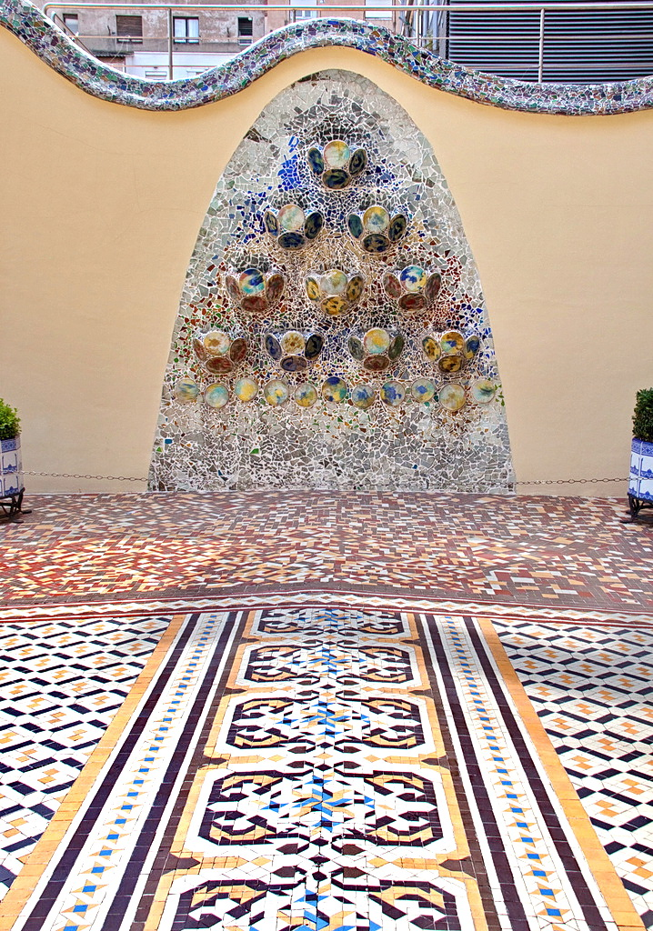 Mur del fons de la terrassa posterior al pis principal de la casa Batlló (1904-1906). Barcelona, Catalunya